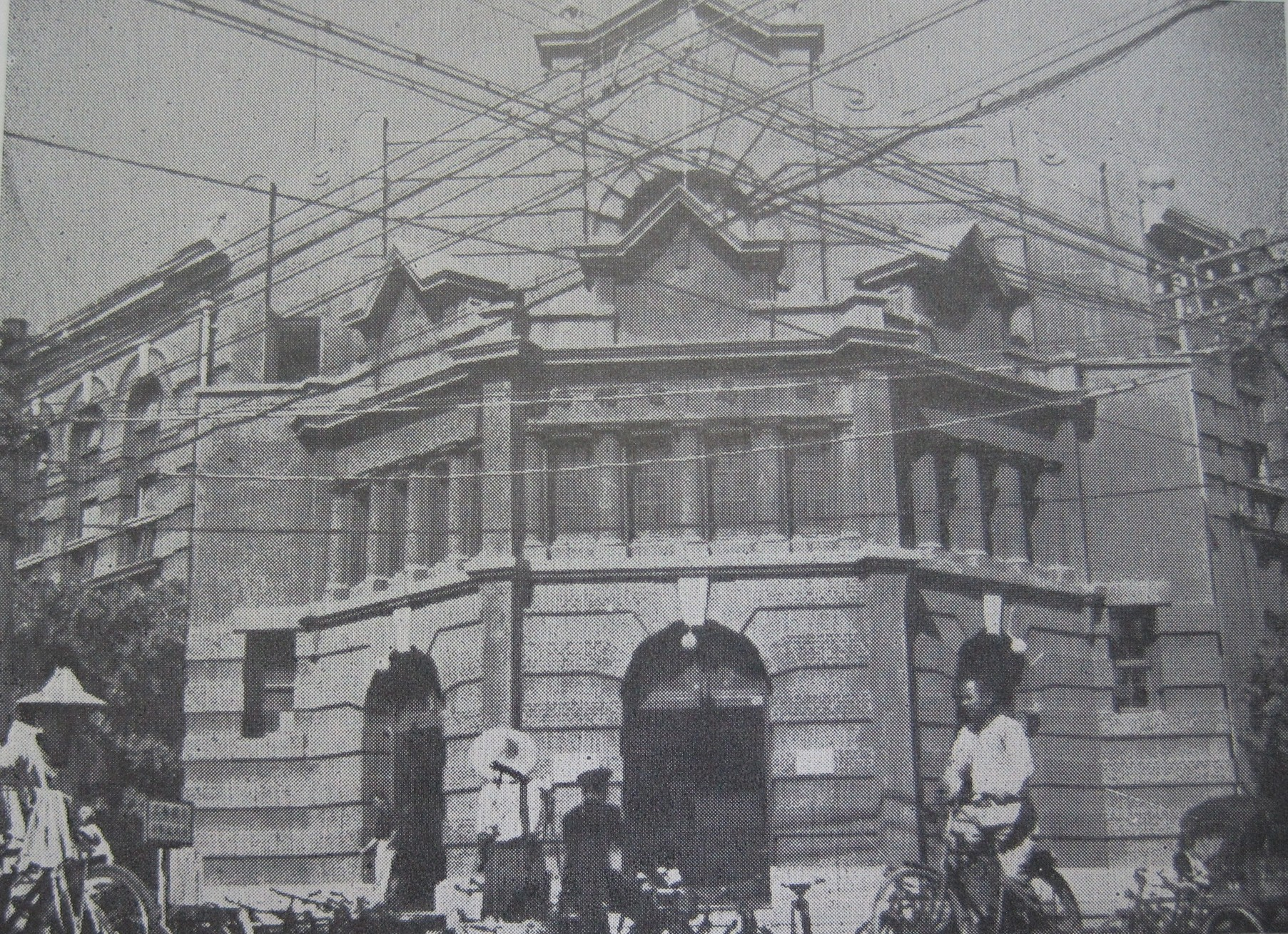 民國時期的臺南郵便局廳舍